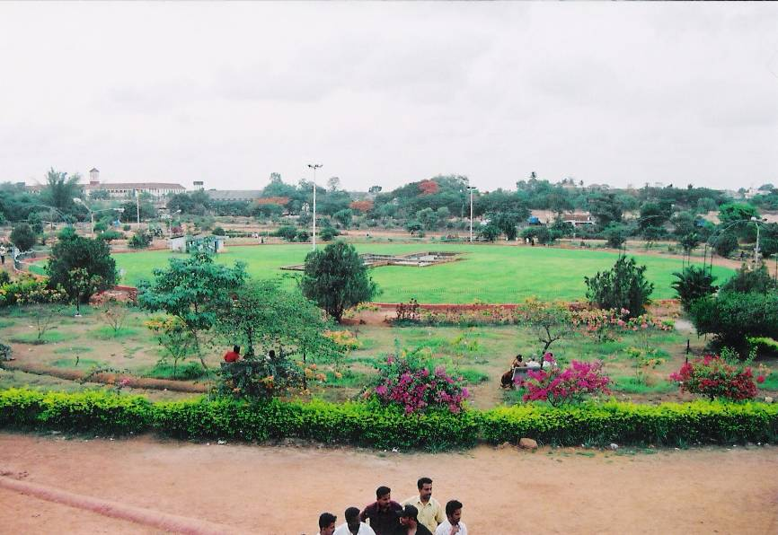 Kadri Park, Mangalore